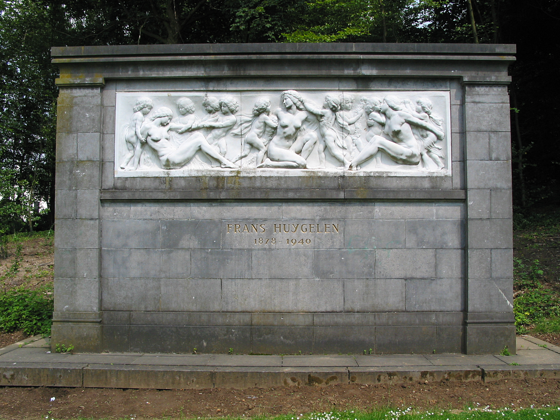 Uccle (Belgique), Parc du Wolvendael - «L'Allégorie du Printemps » - Bas-relief en marbre sculpté en 1924 par Frans Huygelen .